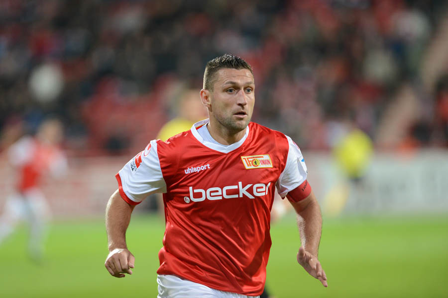 Torsten Mattuschka